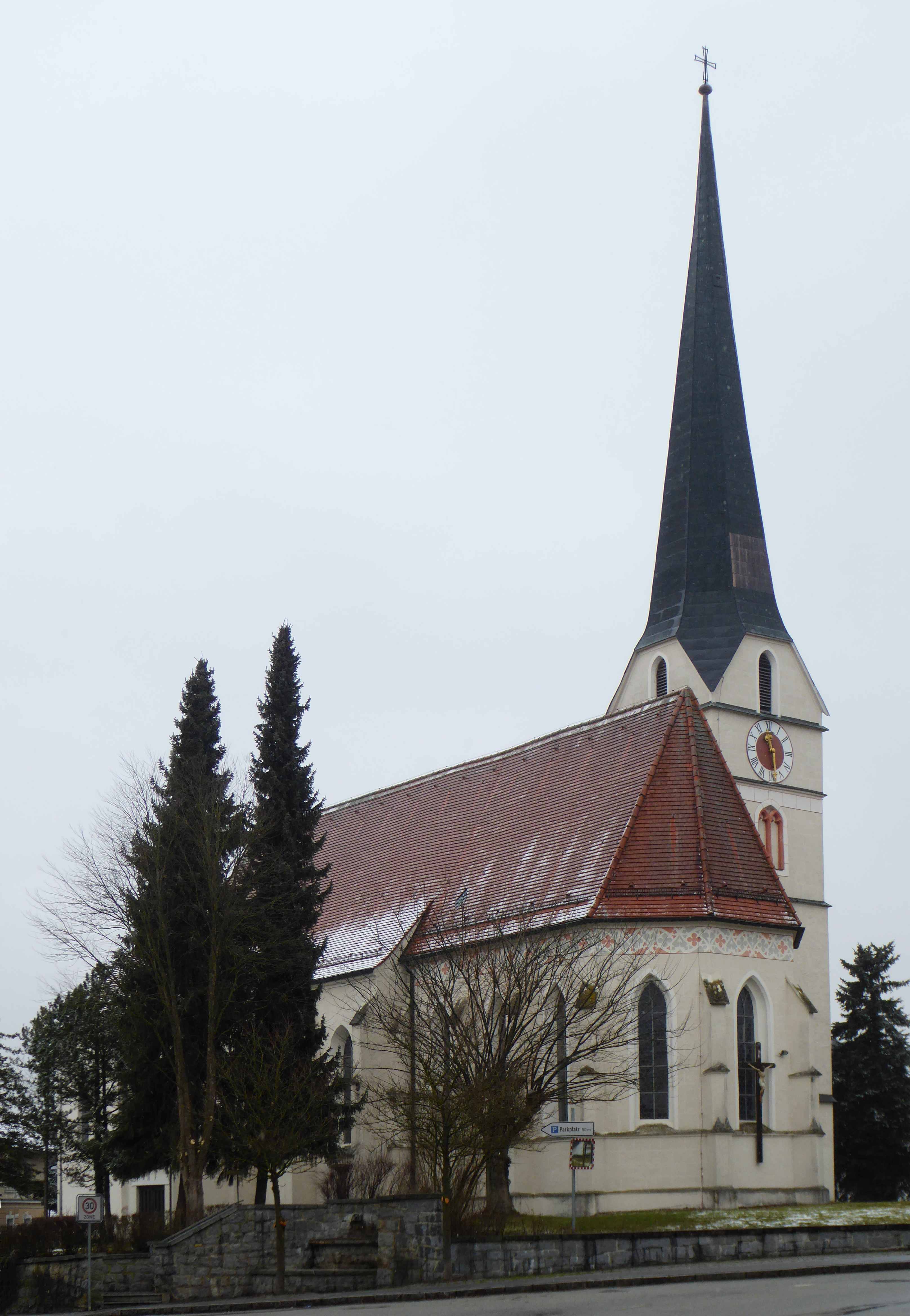 Sulzbach am Inn, Stephanskirche von Südosten.